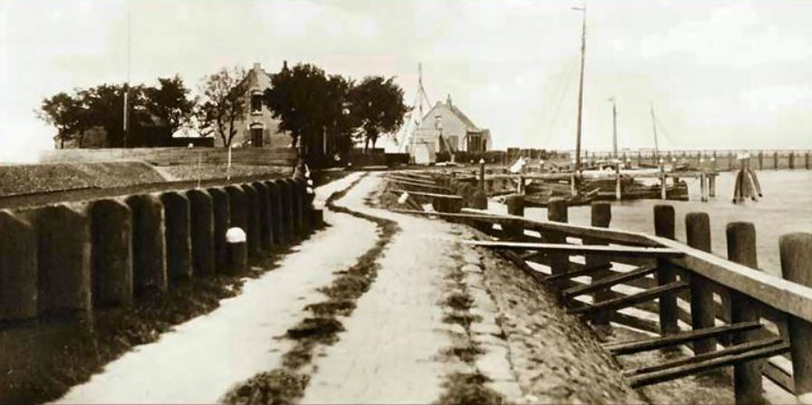 Le port d'Emmeloord à la fin du 19e-début du 20e siècle.